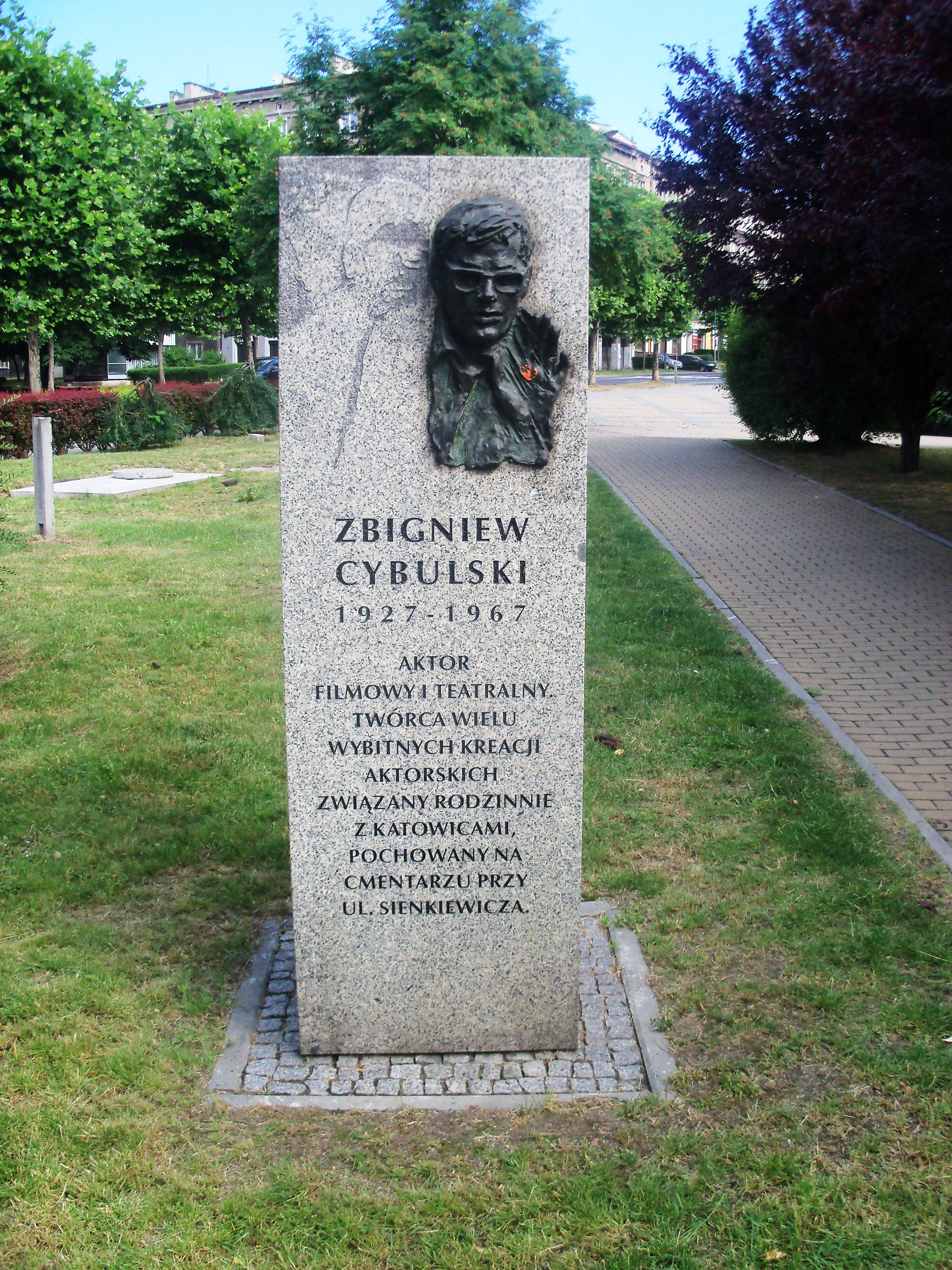 Galeria Artystyczna na placu Grunwaldzkim w Katowicach: Rzeźba przedstawiająca Zbigniewa Cybulskiego